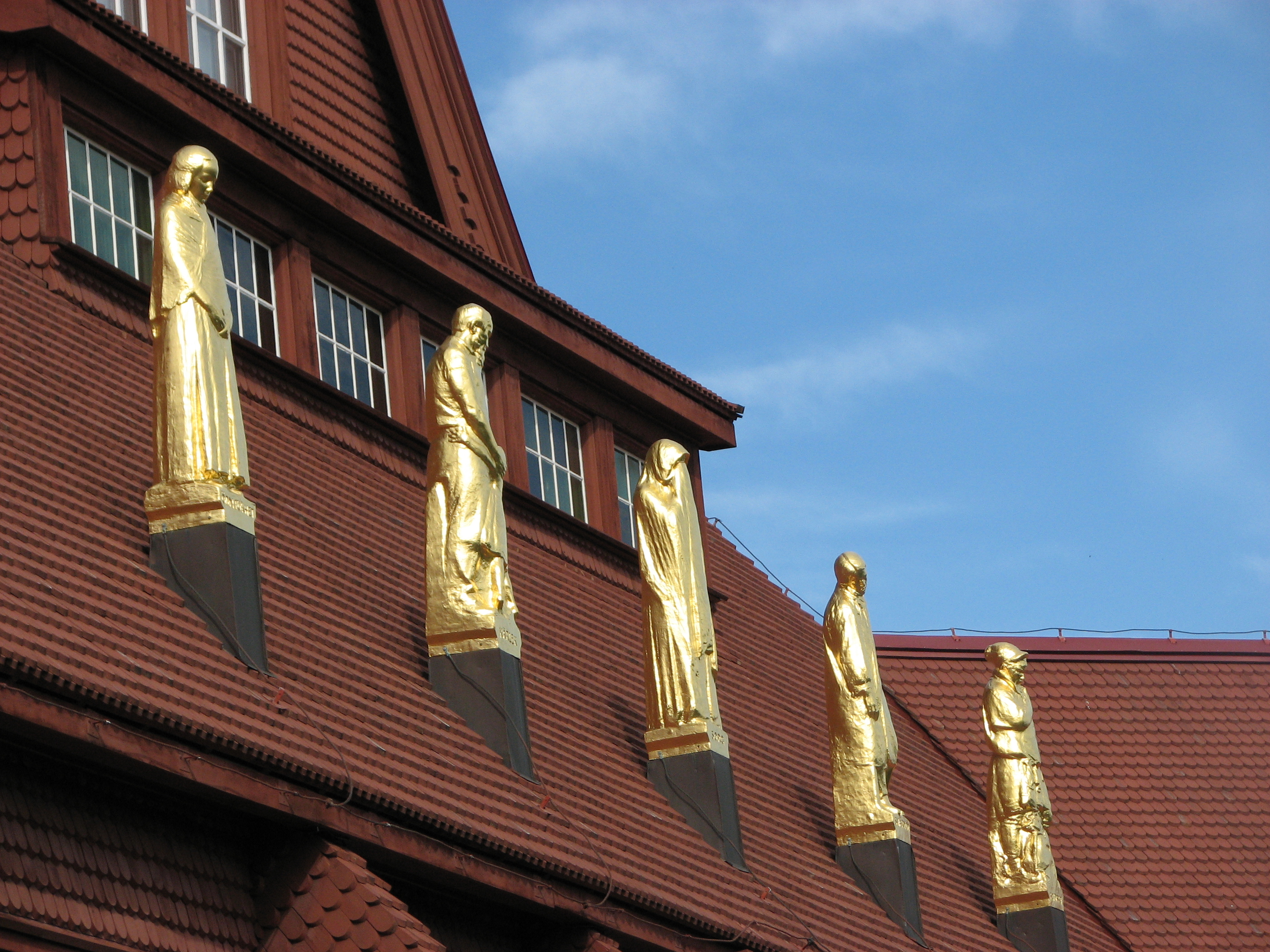 Kiruna church. Sweden. Year 2009